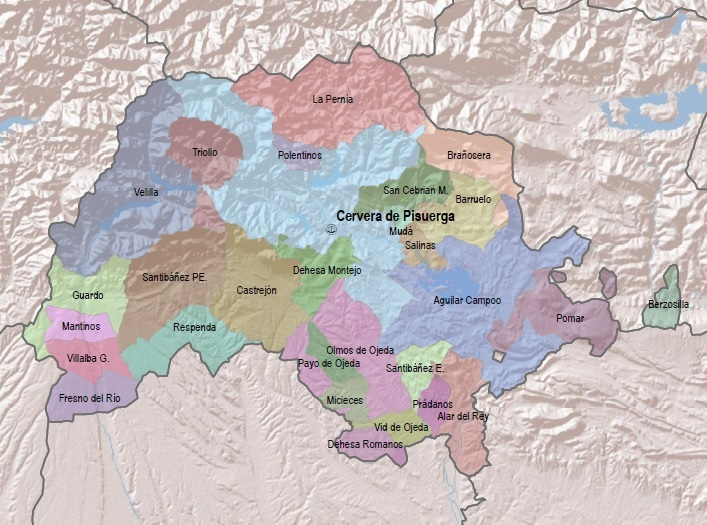 Cartografía del partido judicial de Cervera de Pisuerga, en la provincia de Palencia (España).